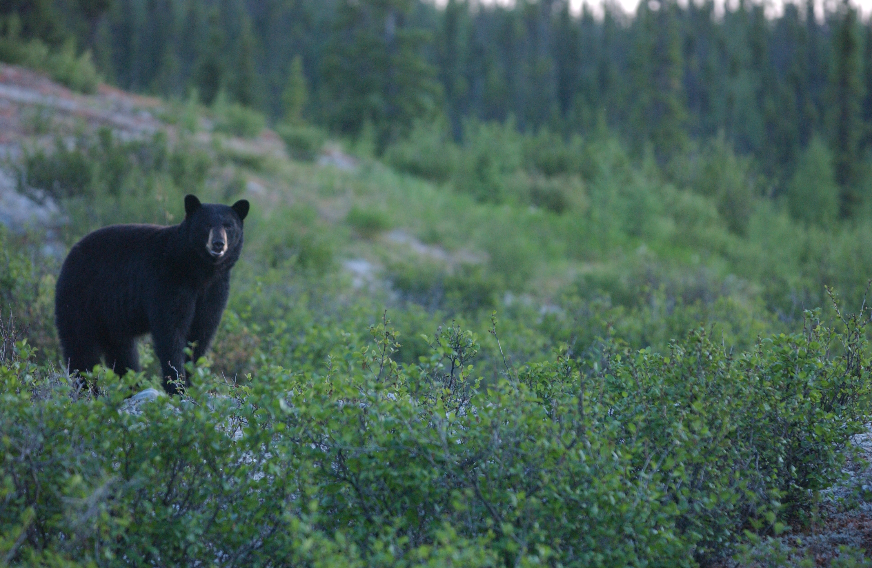 Nez au vent, cet ours continue de collecter des informations sur le photographe.